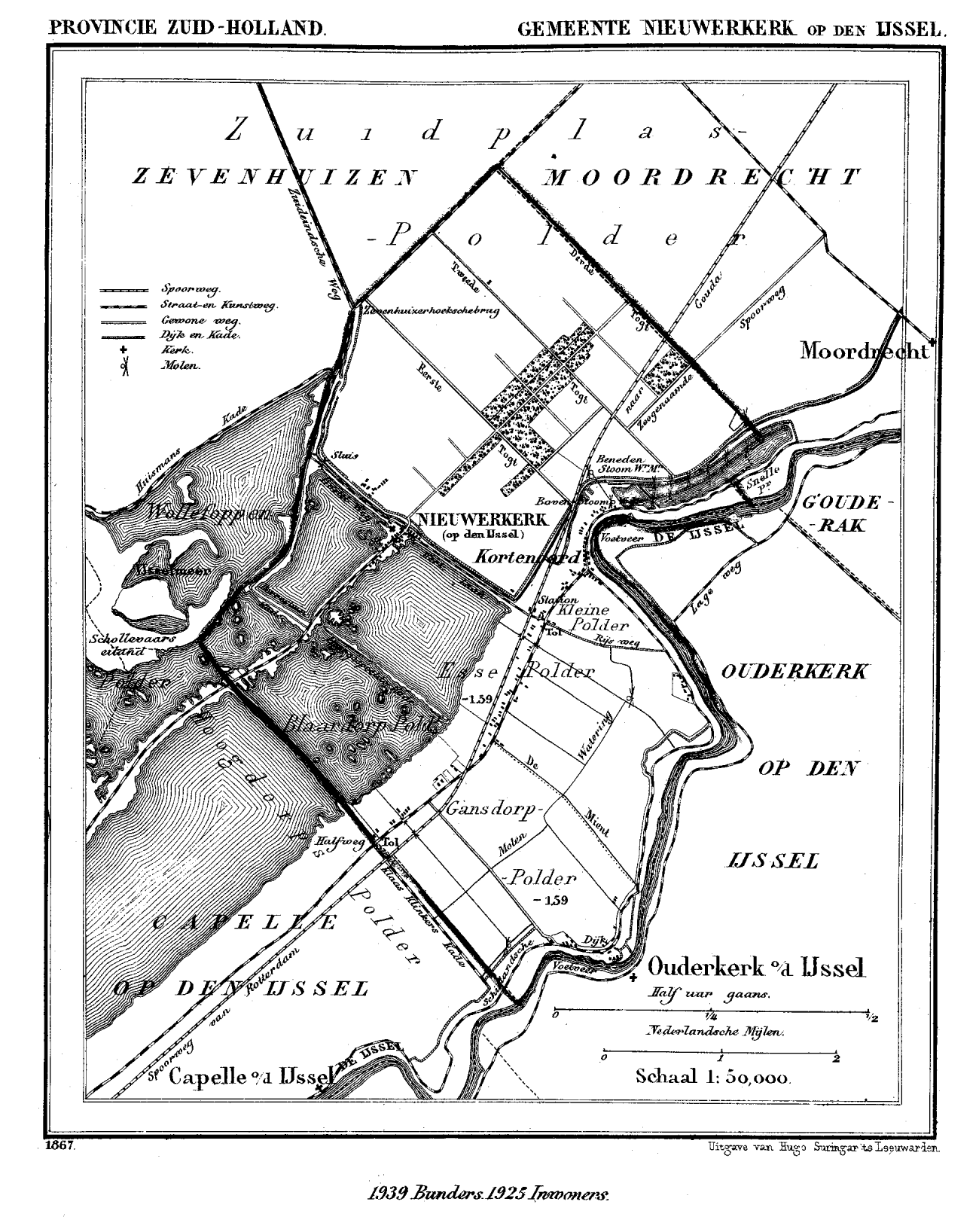 Kaart van Nieuwerkerk aan den IJssel uit Gemeente Atlas van Nederland, J. Kuyper 1865-1870, Uitgave Hugo Suringar Leeuwarden.